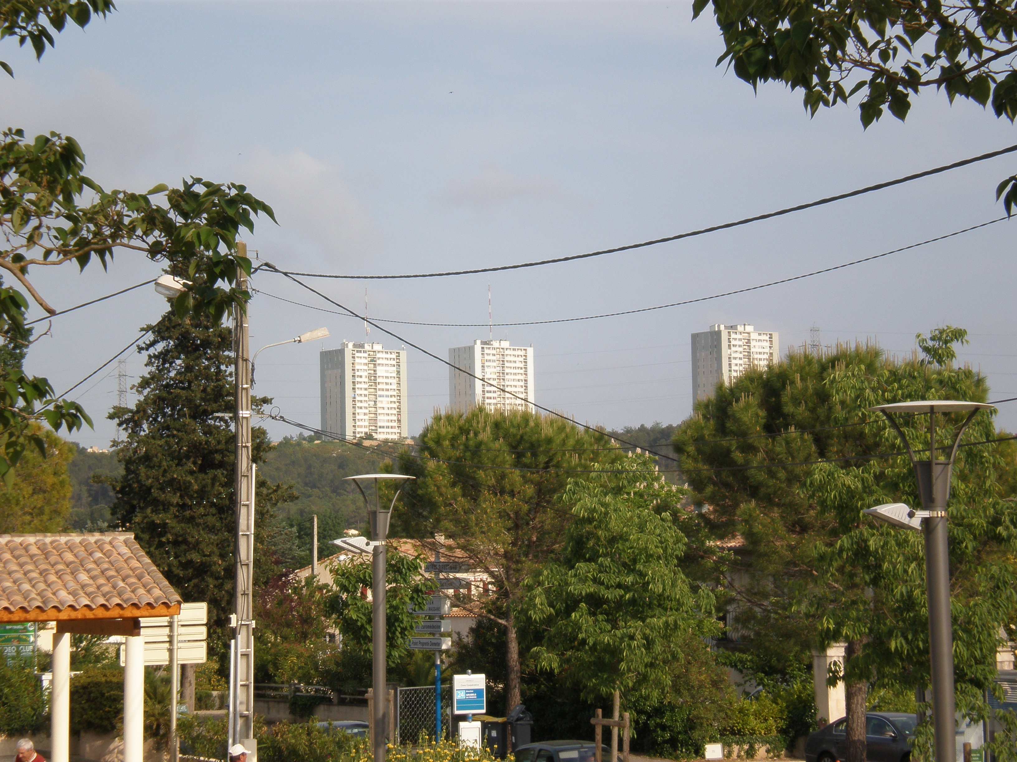 Vue des tours de la Paillade depuis le village de Grabels (Hérault)